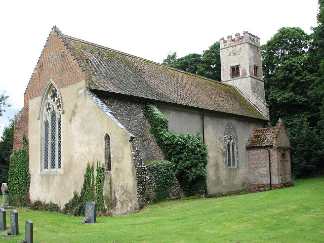 St Michael's church